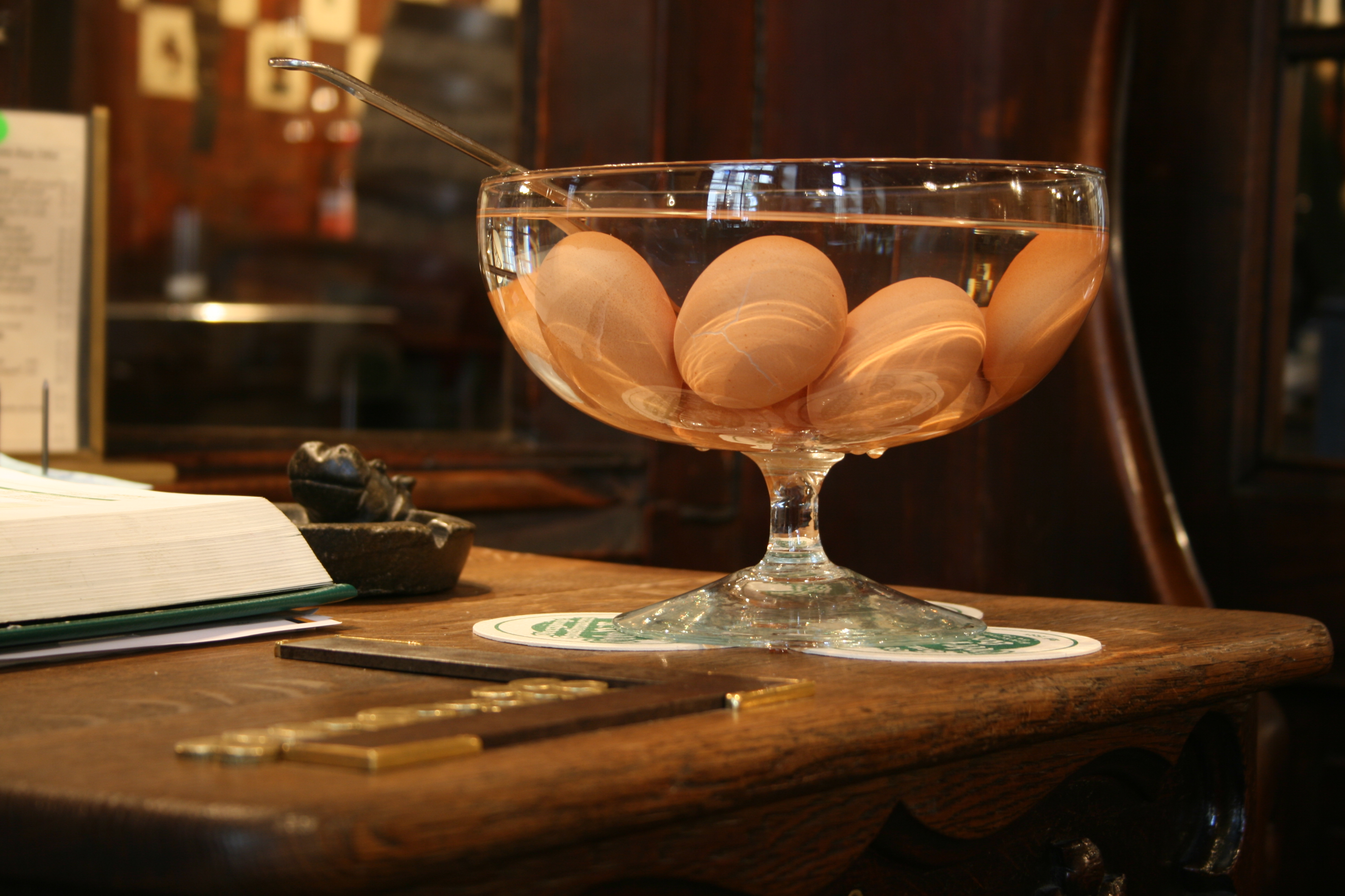 Soleier im Glas in einem Gasthaus